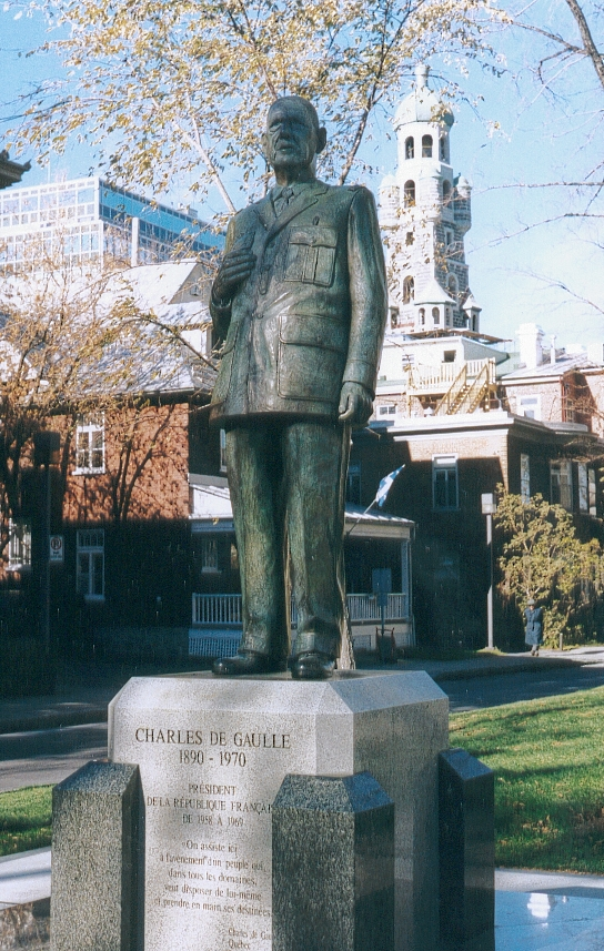 Auteur : FC Georgio Sujet : Statue du Général de Gaulle Lieu : Ville de Québec, Canada